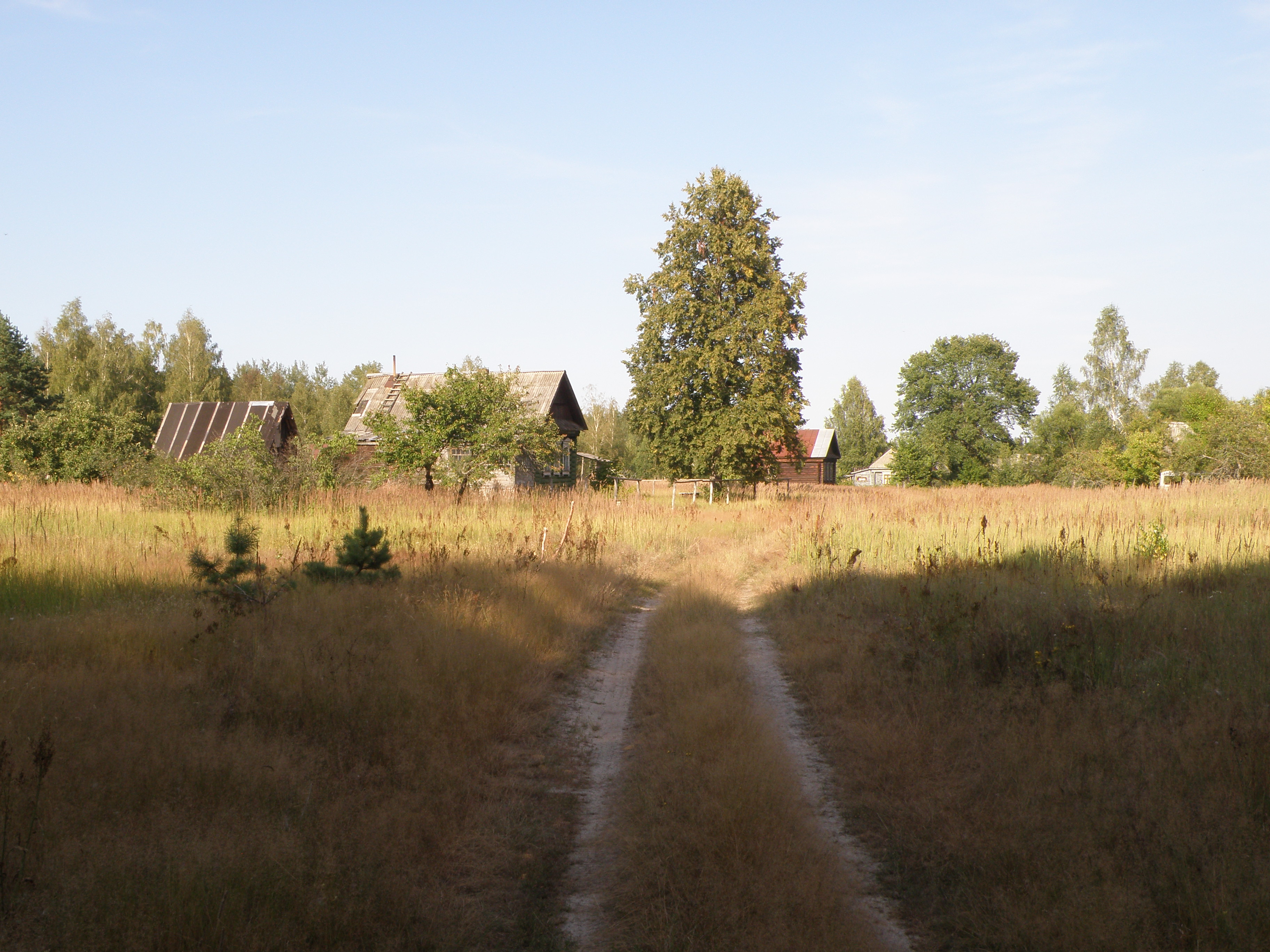 Шестимирово (Владимирская область)